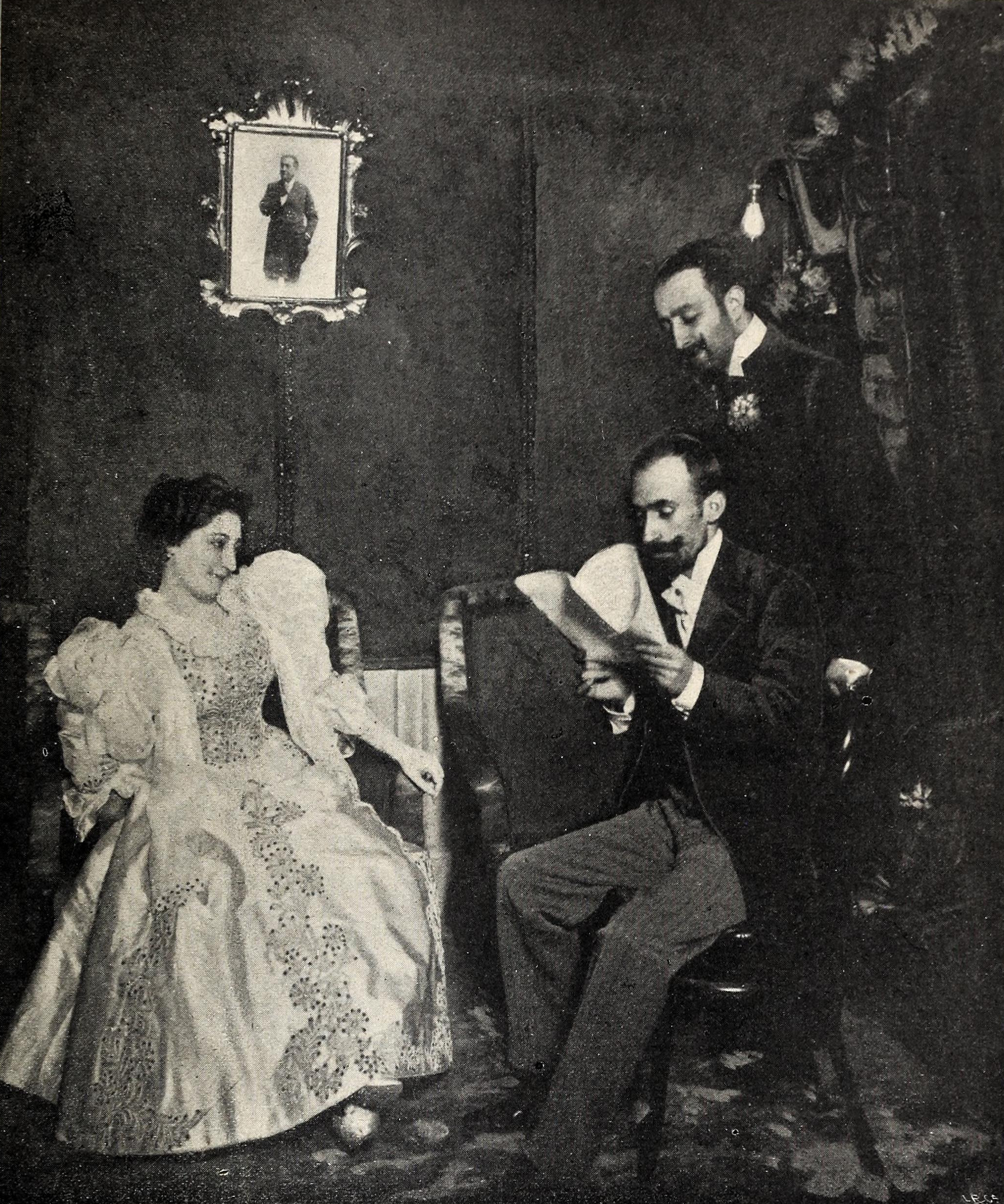 Jacinto Benavente leyendo Gente conocida a la señorita Cobeña y al señor Thuillier.